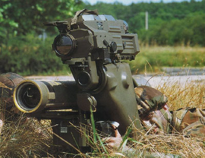 Missile controcarro Milan, Esercito Italiano